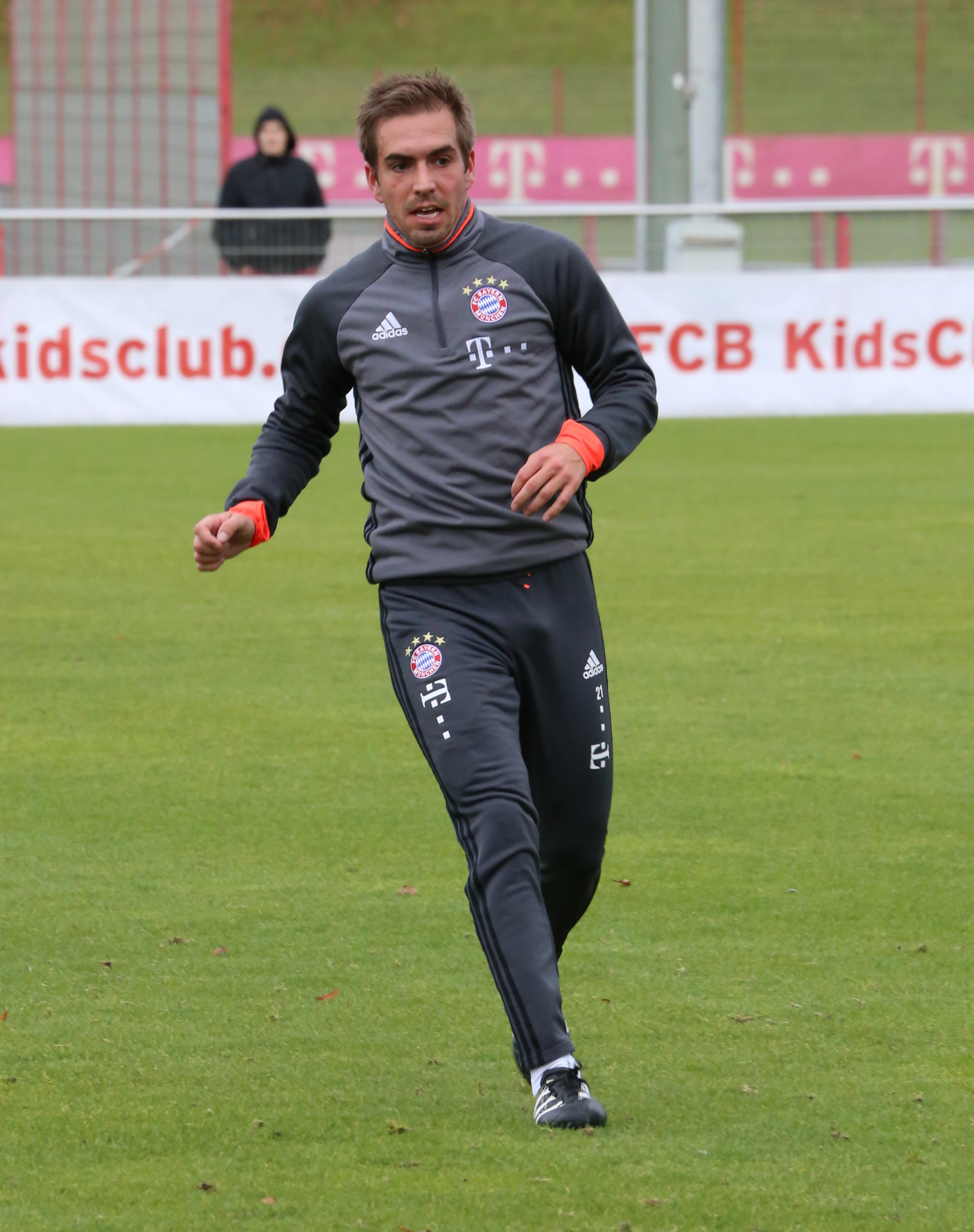 Philipp Lahm beim Training auf dem Gelände des FC Bayern München (November 2016)